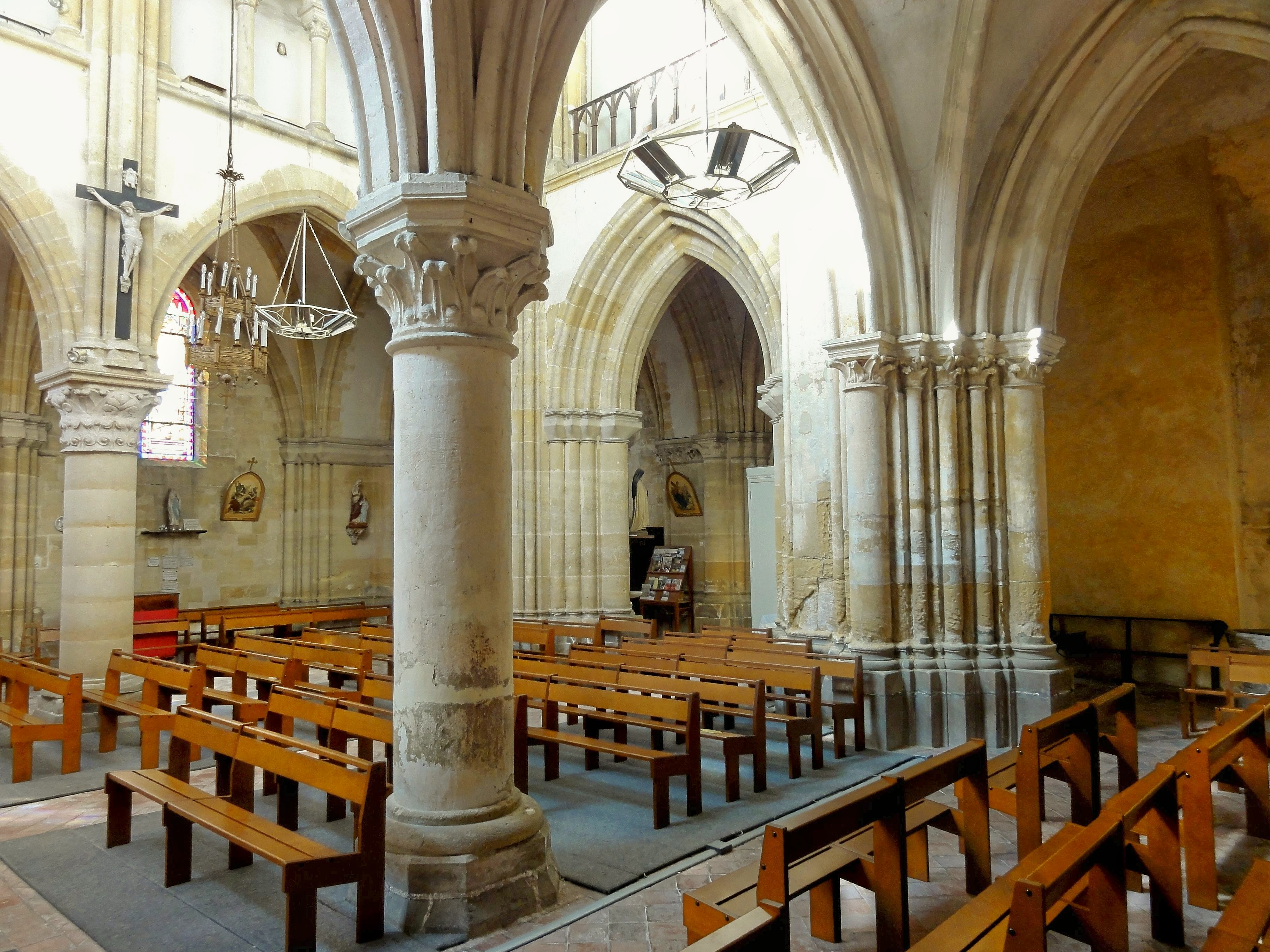 Vue intérieure depuis la dernière travée du bas-côté nord.